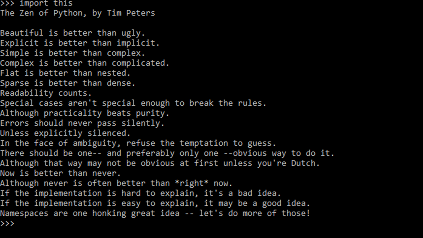 19 העקרונות של טים פיטרס לכתיבה בפייתון